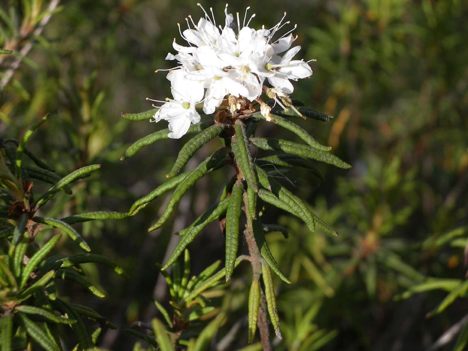 Sumpfporst (Ledum palustre) im NSG Buddenhagener Moor, Mecklenburg-Vorpommern.